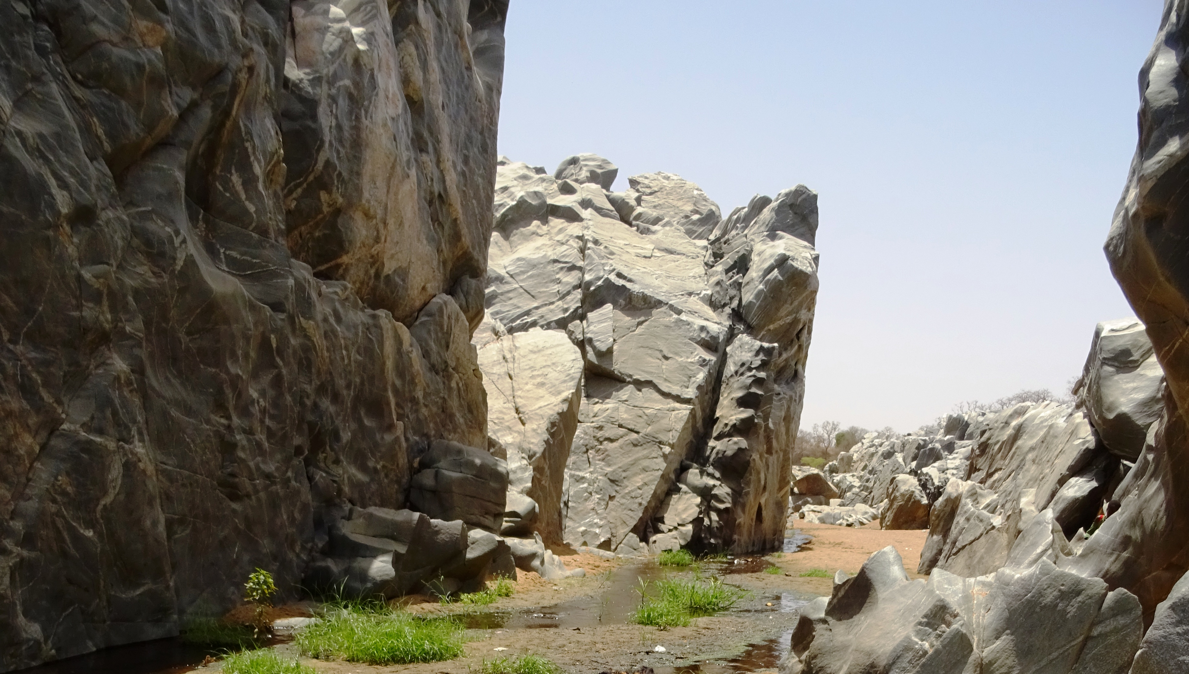 site touristique Gorge de Kola à 5 km de la ville de Guider, Département du Mayo Louti, Région du Nord Cameroun.